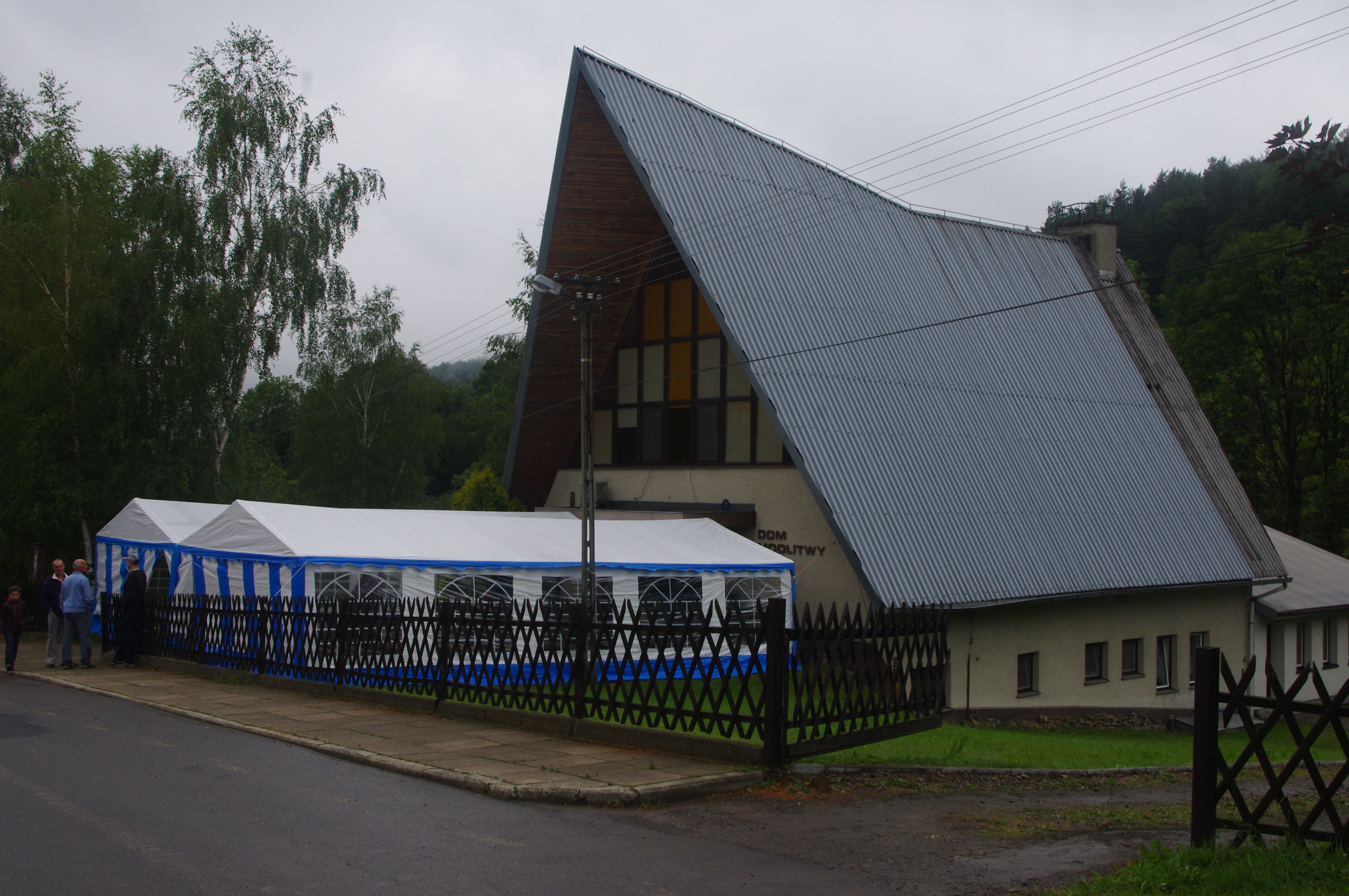 Zbór Ewangelicznej Wspólnoty Zielonoświątkowej w Puławach koło Rymanowa w czasie trwania Młodzieżowej Konferencji EWZ